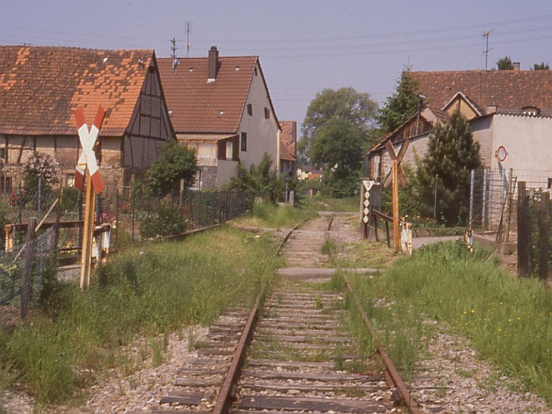 Stillgelegte Bahntrasse in Odenheim. Ehemalige Bahntrasse im Ort Odenheim.